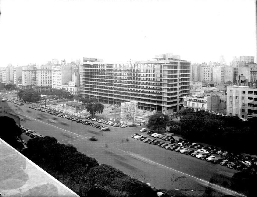 Estructura de hormigón armado para el nuevo Mercado del Plata y oficinas de la Municipalidad de Buenos Aires, en construcción en 1954. Visto desde la Avenida 9 de Julio, entre Perón y Sarmiento.